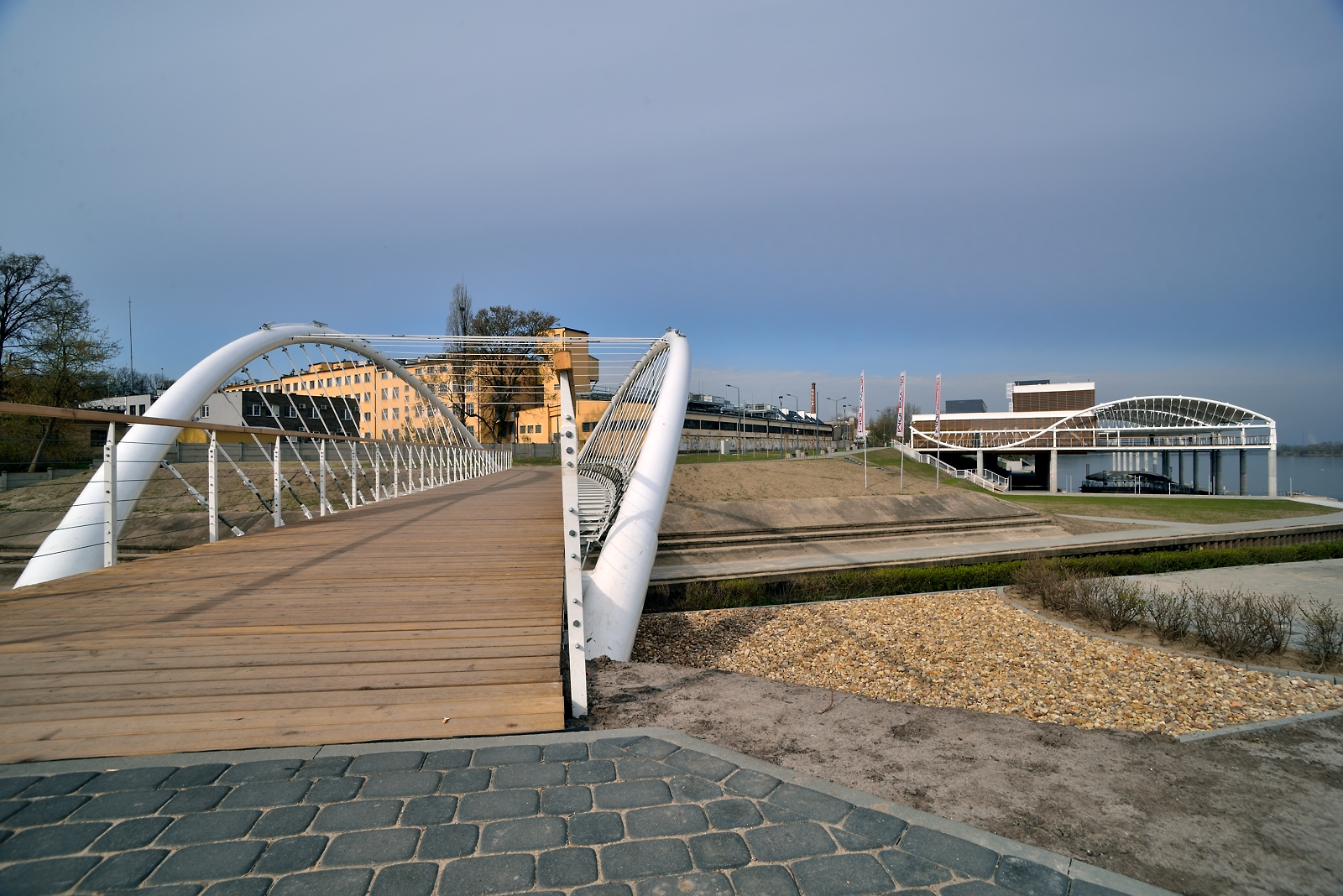 Przystań wodna im. Jerzego Bojańczyka we Włocławku